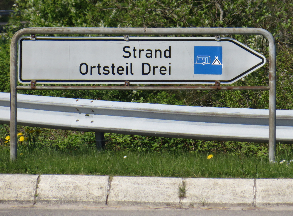 Ortstteil Drei - Schild Cutversion